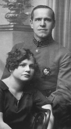 Г.К. Жуков с женой Александрой Диевной. 1920-е годы